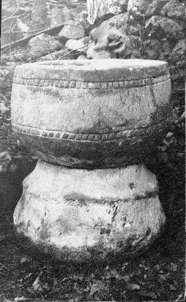 Dopfunt, sandsten, 11-1200-talet. Kategori: (04) DopfuntarDopfunt, sandsten, 11-1200-talet.